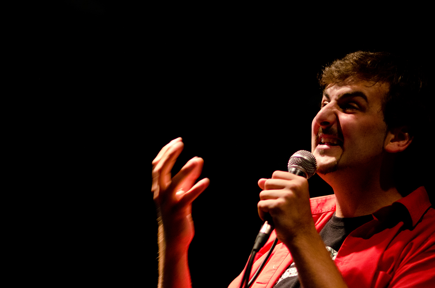 Radek Petráš, stand-up komik a herec